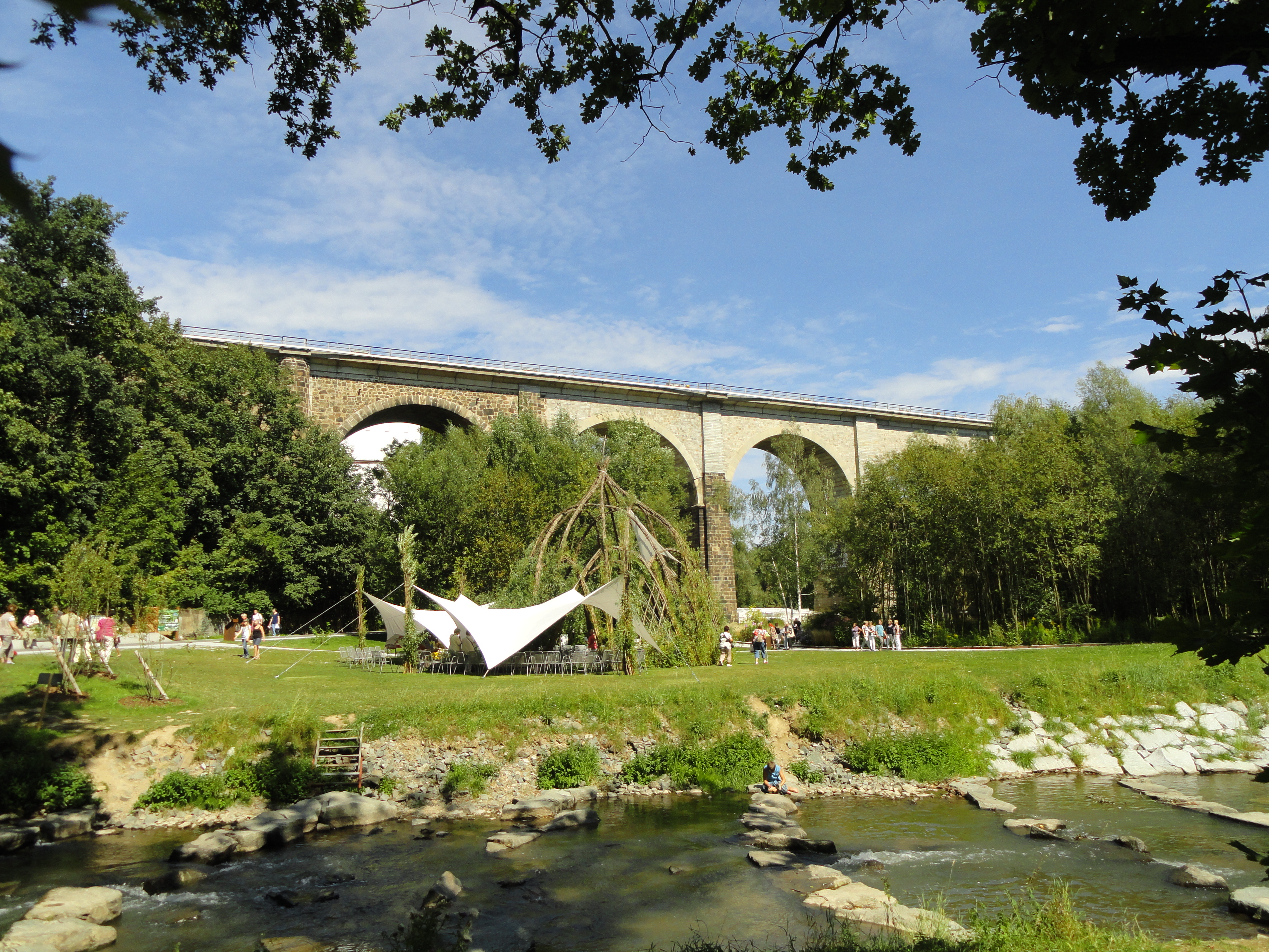 Eisenbahnviadukt in Löbau mit dem Ausstellungsgelände der Sächsischen Landesgartenschau 2012